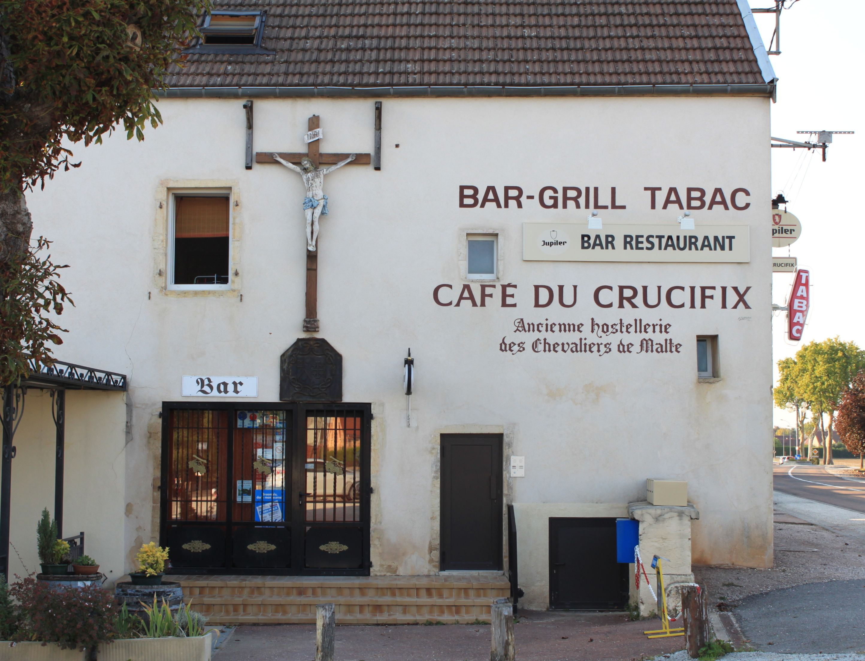 Crimolois, Côte d'Or, Bougogne, France